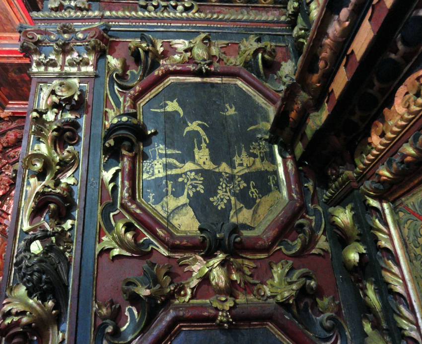 Painel orientalizante na Igreja de Nossa Senhora do Ó